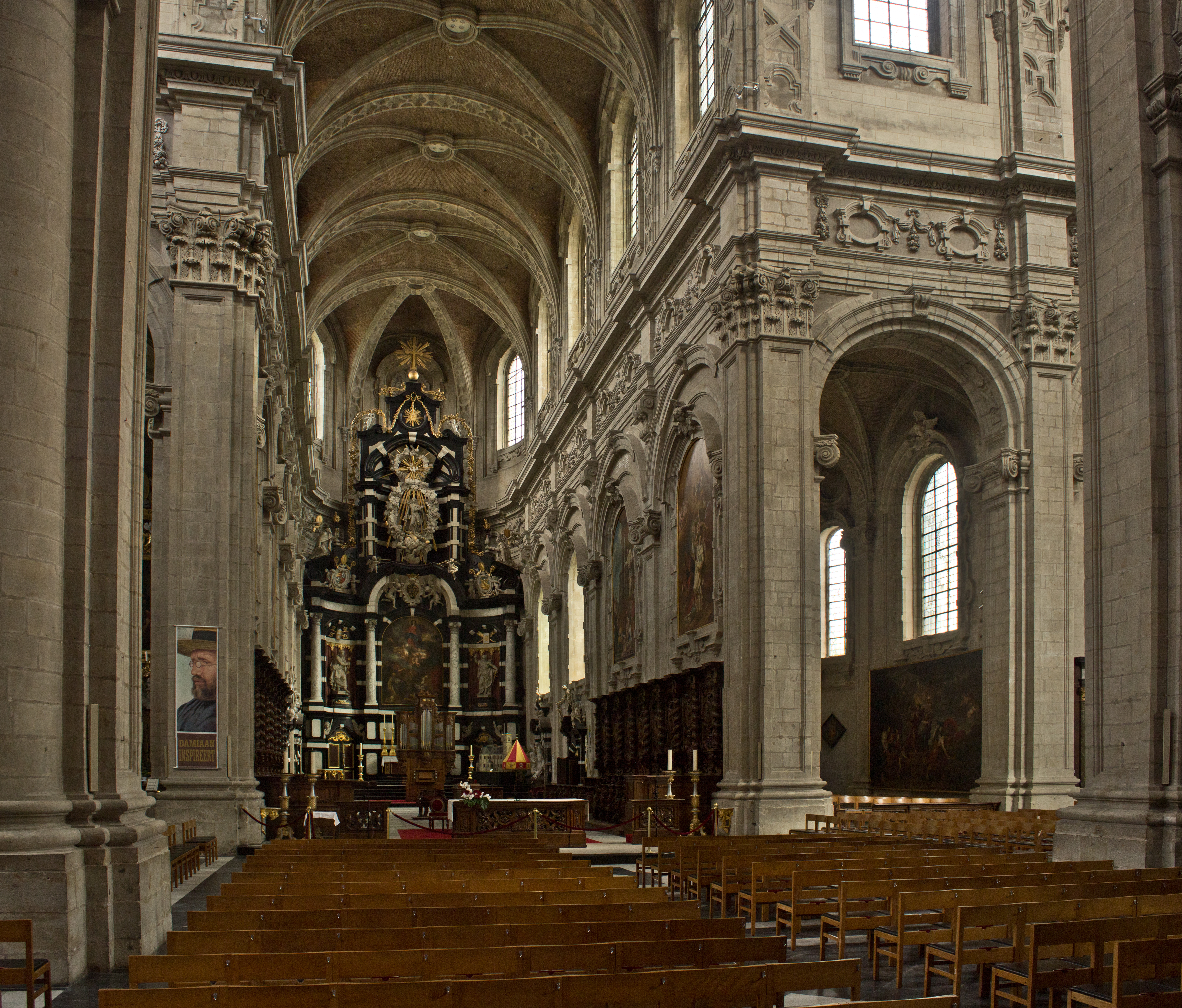 Zicht op het ship, transept, en koor van de abdijkerk van Grimbergen